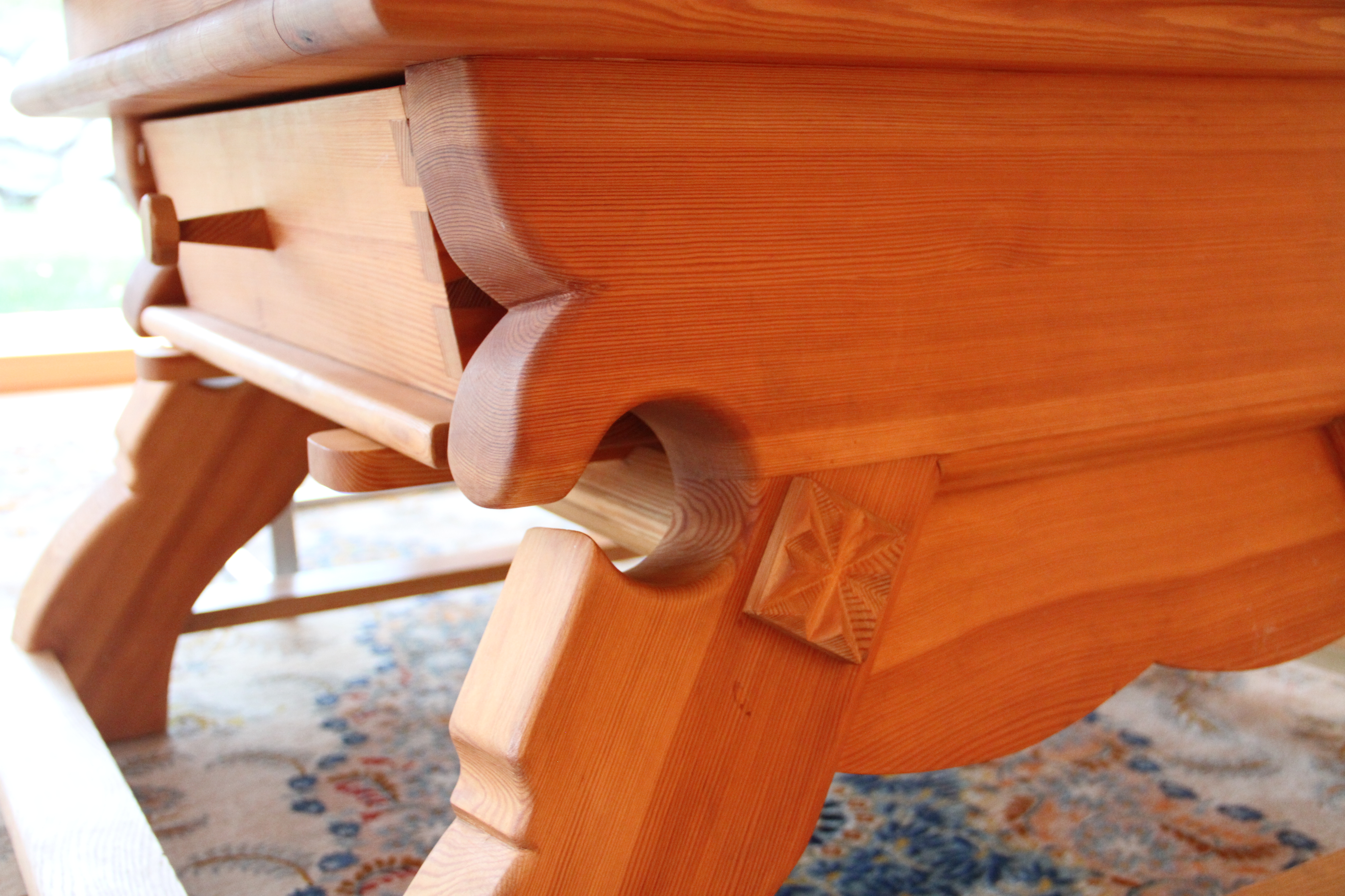 Detailansicht eines Jogltisches; Bestecklade